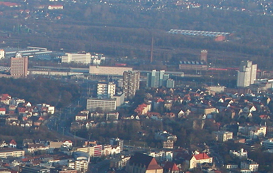 Blick auf die Hochhäuser rund um den Berliner Platz und den Hauptbahnhof in Braunschweig.